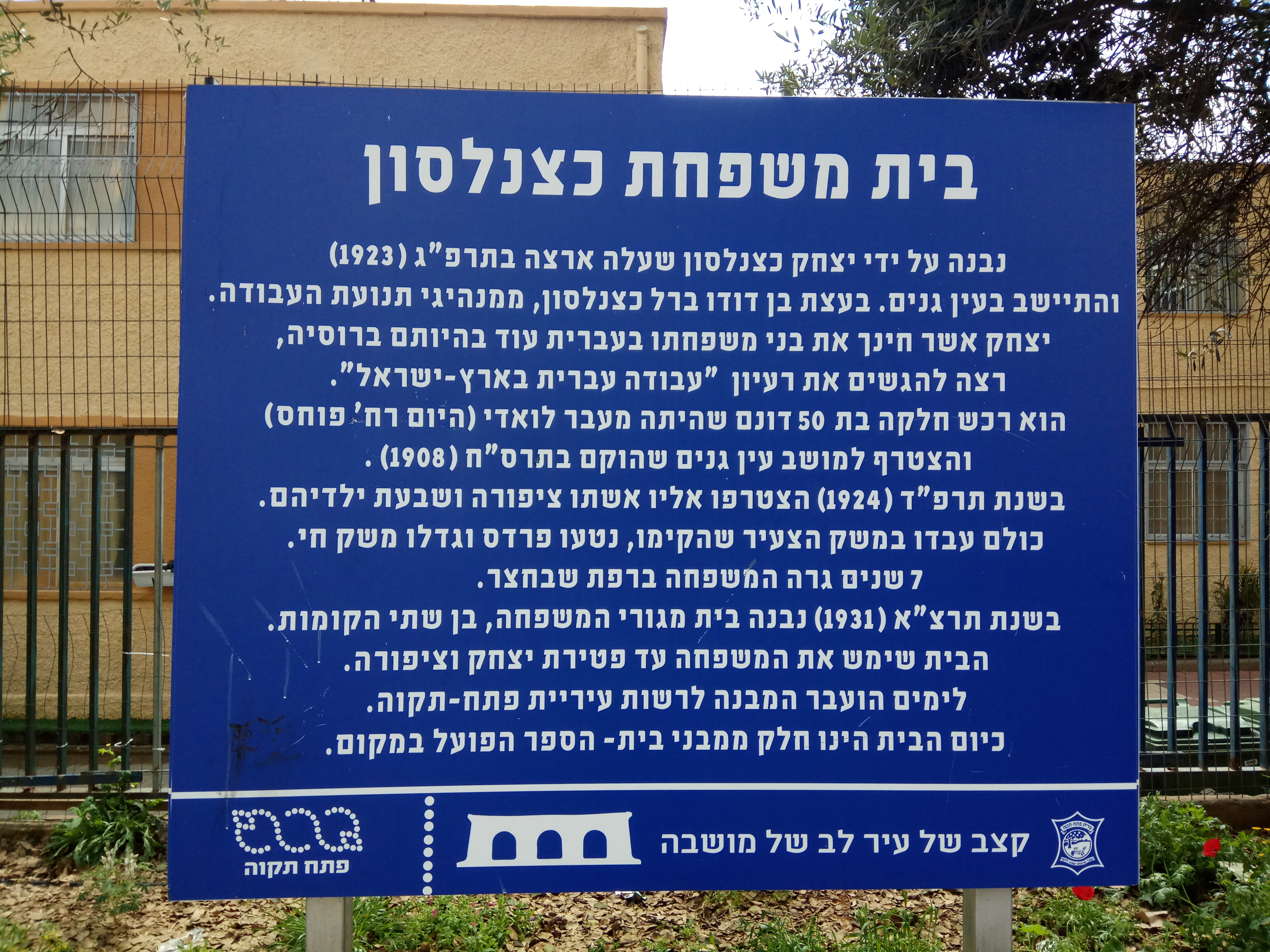 שלט על בית כצנלסון ברחוב פוחס בעין גנים, פתח תקווה